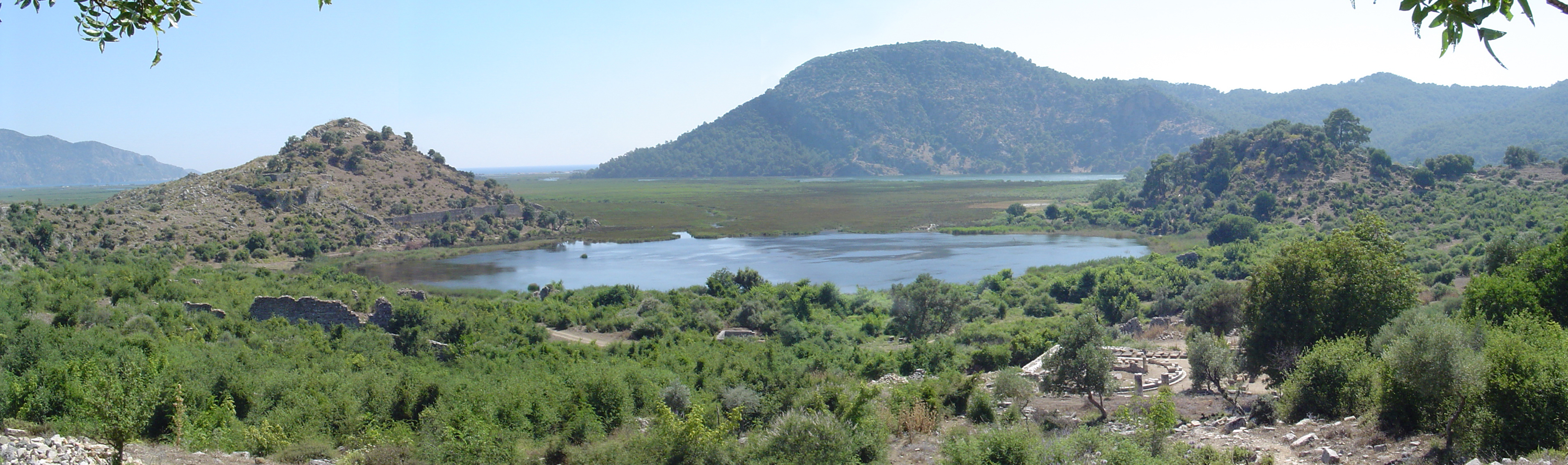 Hafen von Kaunos, fotografiert Juli 2003